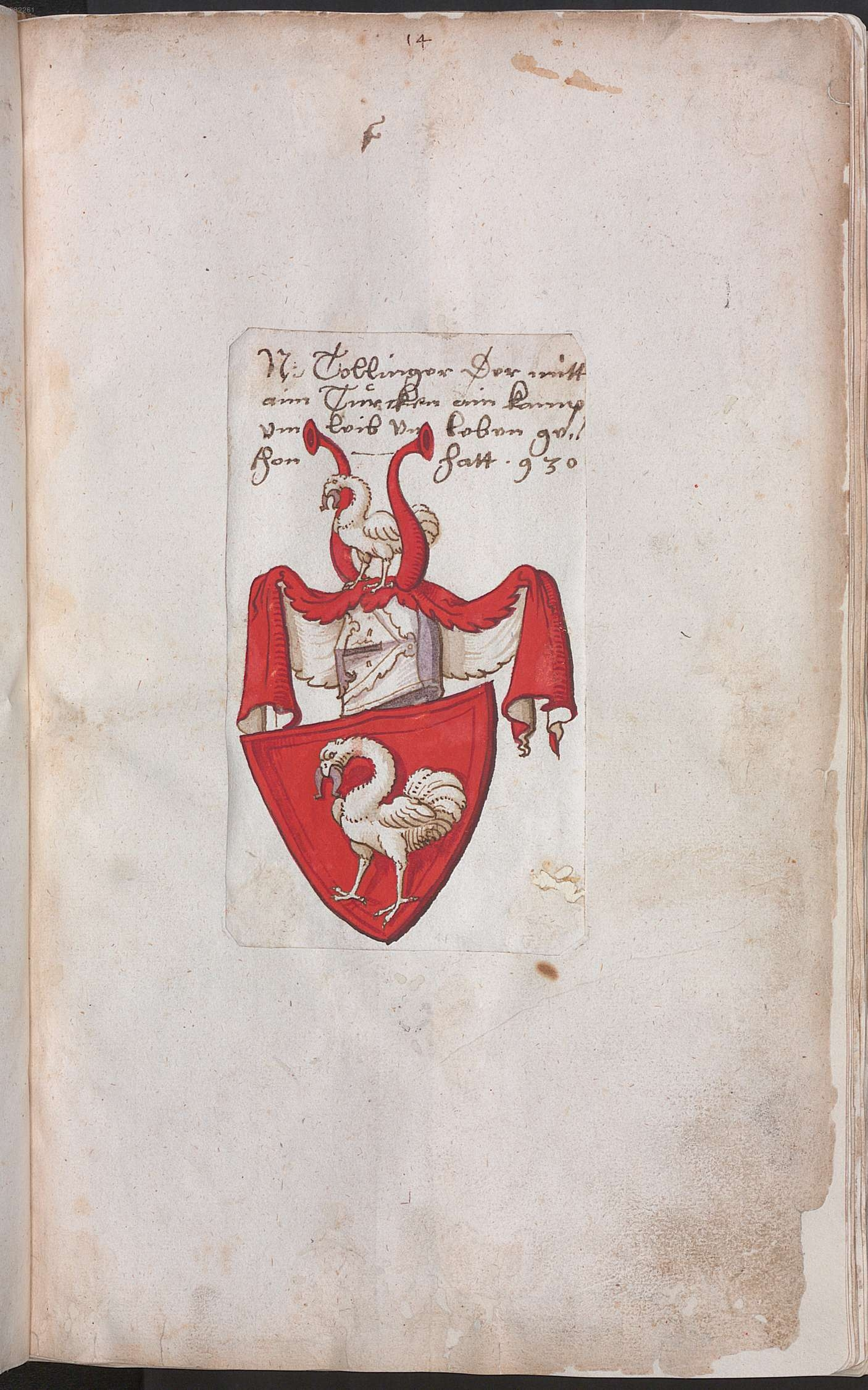 Hans Hylmair's (Goldschmids) Regensburgisches Wappenbuch. München, Bayerische Staatsbibliothek, Signatur: Cgm 2015